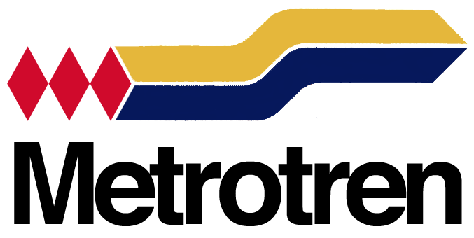 Emblema de Metrotren en los años 90.